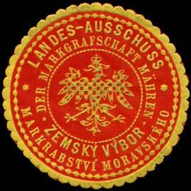 Sealing stamp Title: Landes-Ausschuss der Markgrafschaft Mähren Description: rot, gelb, geprägt Place: Brünn size: 5 cm